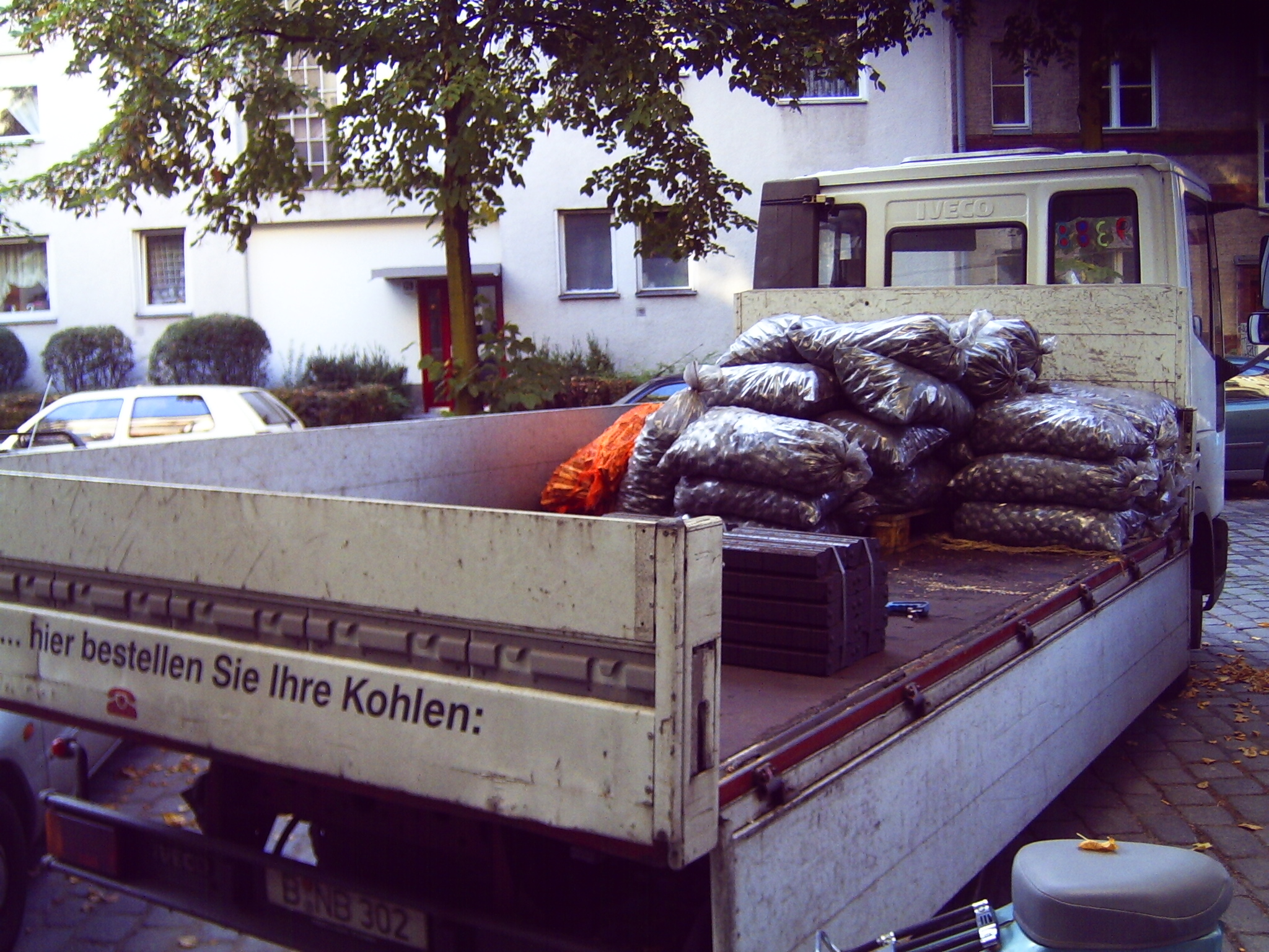 Anlieferung von Heizmaterial: Holzscheite zum Anheizen, gebündelte Briketts und Eierkohle in Säcken. Das Bild entstand in Berlin, Wilhelms-Aue, einer gutbürgerlichen Wohngegend. Laut Auskunft des Fahrers liefert er auch an Haushalte am Kurfürstendamm, wo es noch viele Einzelheizungen geben soll.